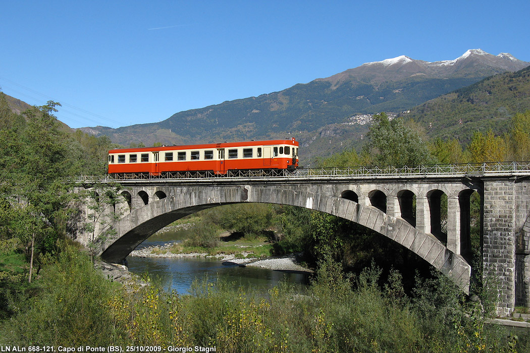 A ottobre 2009 si organizza un treno speciale Rovato-Malonno, sicuramente uno dei più bei treni fotografici degli ultimi anni. Poco dopo Capo di Ponte, la ferrovia varca l'Oglio su un bel manufatto ad arco ribassato.